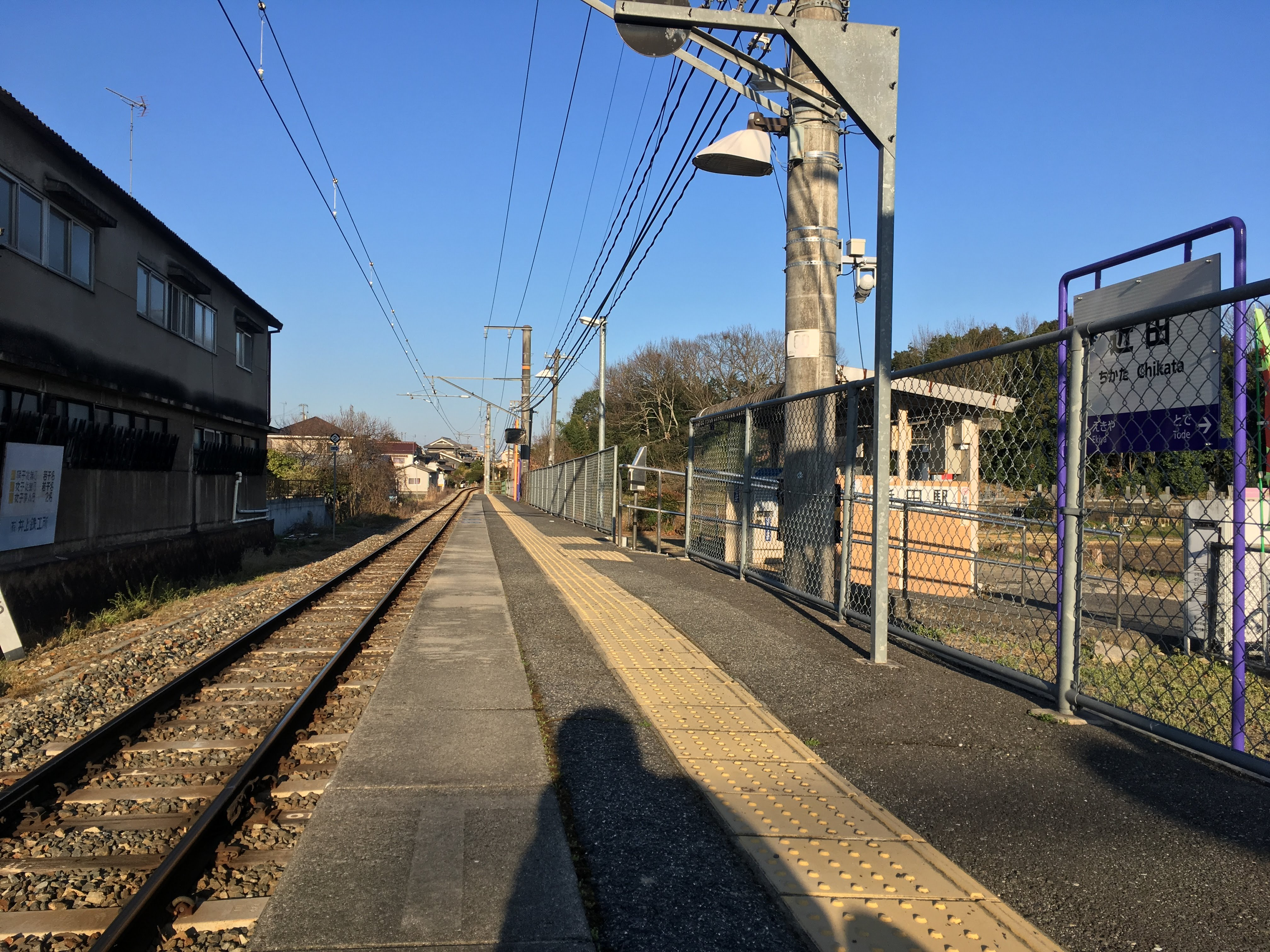 駅ホームと線路 Train Home ＆ Train Line